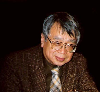 Japanese philosopher Yoshihiro Nitta (jap. 新田 義弘, Nitta Yoshihiro; * 1929)